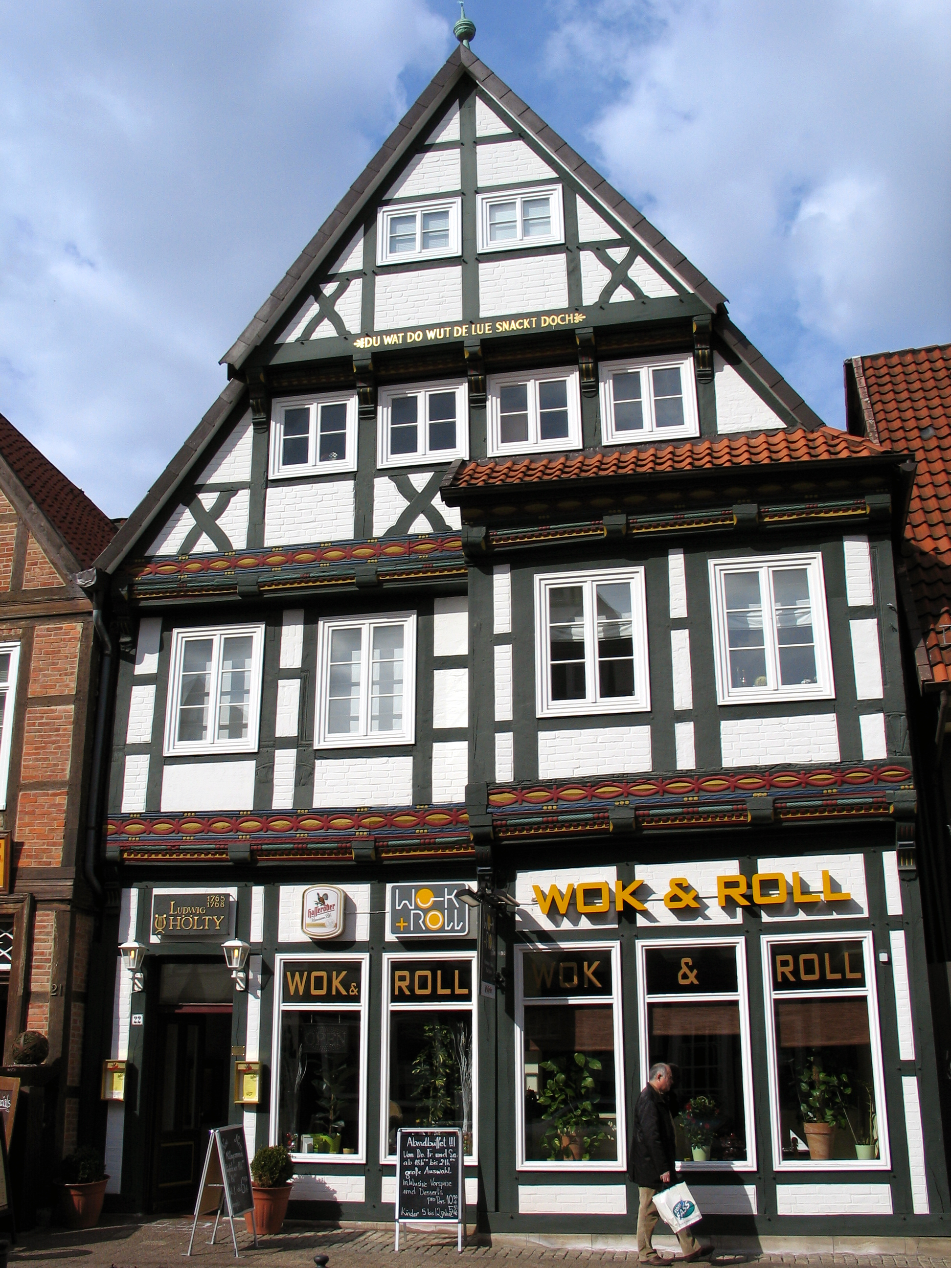 Das denkmalgeschützte Fachwerkhaus unter der heutigen Adresse Schuhstraße 22 in der Altstadt von Celle war laut einer Inschrift über dem Hauseingang Wohnsitz des Dichters Ludwig Hölty in der Zeit von 1765 bis 1768 ...